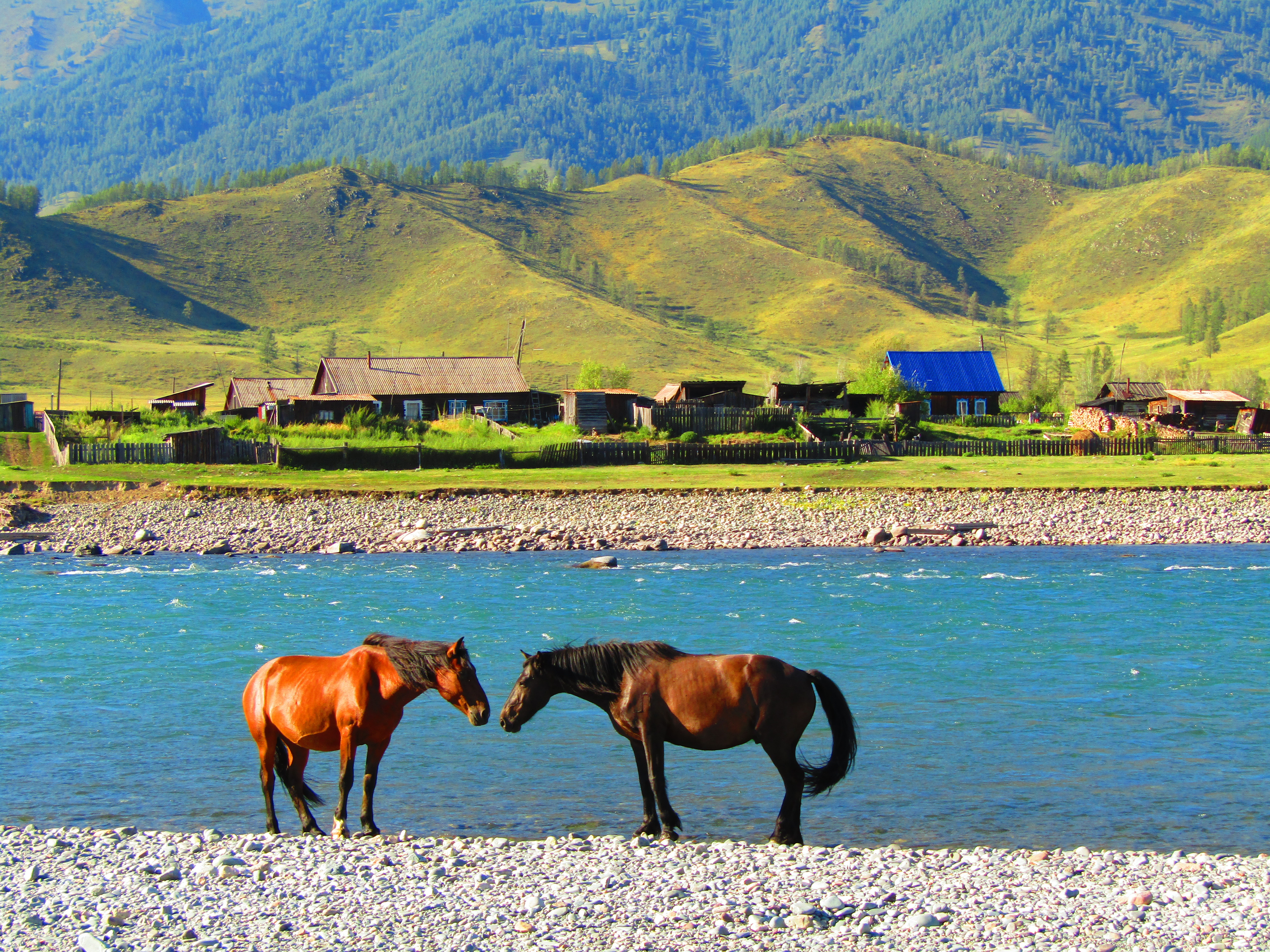 Природный парк «Белуха»: Территория занимает трансграничное положение - юго-восточная граница Парка совпадает с государственной границей России и Казахстана. Протяженность этой границы составляет 12 км. Восточная граница Парка совпадает с границей муниципальных образований "Усть-Коксинский район" и "Кош-Агачский район", Усть-Коксинский район, Алтай This image is related to the protected area of Russia number 0410040